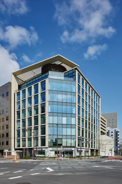 本社・菱進御成門ビル